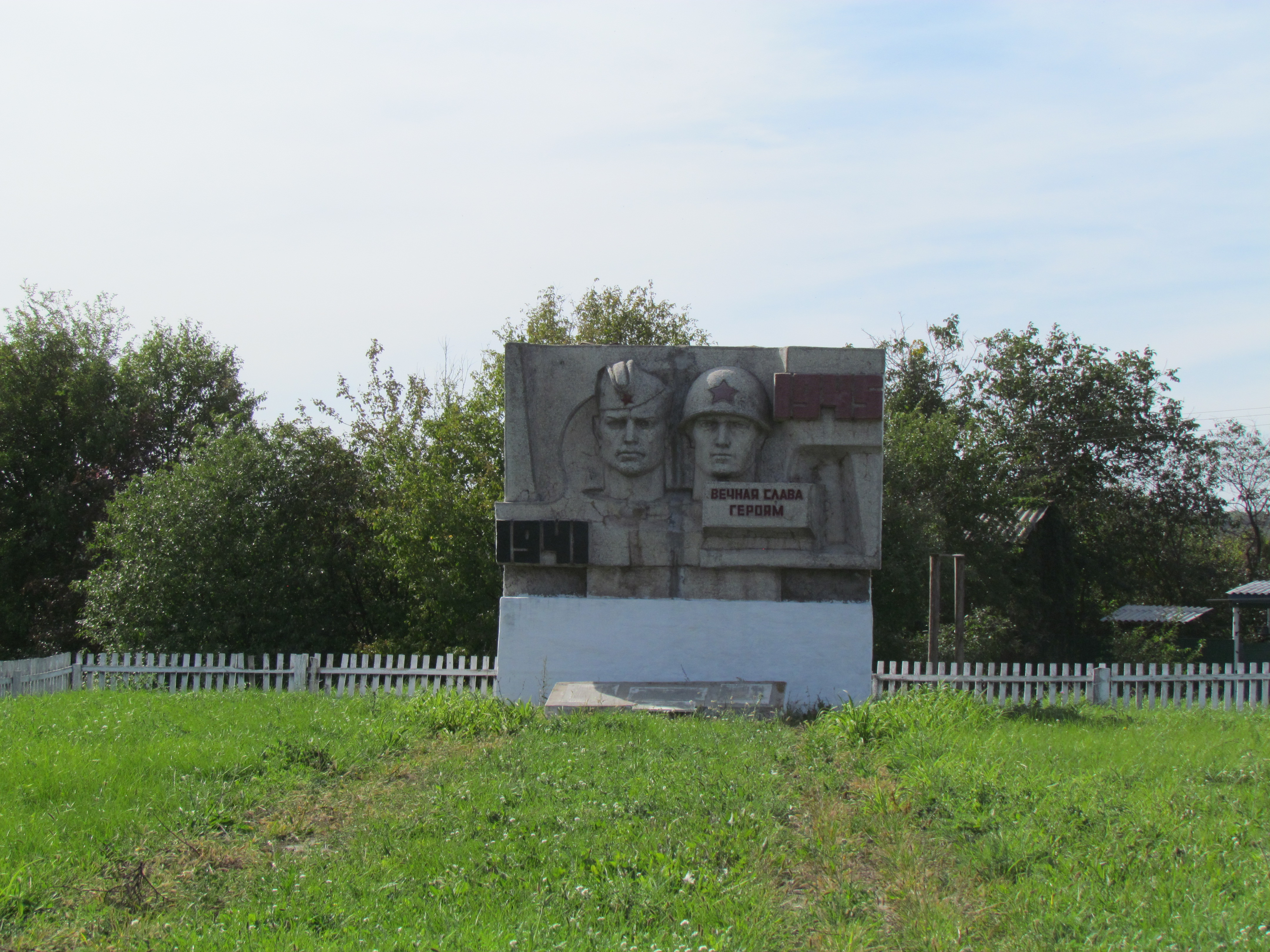 смт. Велика Багачка. Братська могила радянських воїнів, партизанів, пам’ятник землякам